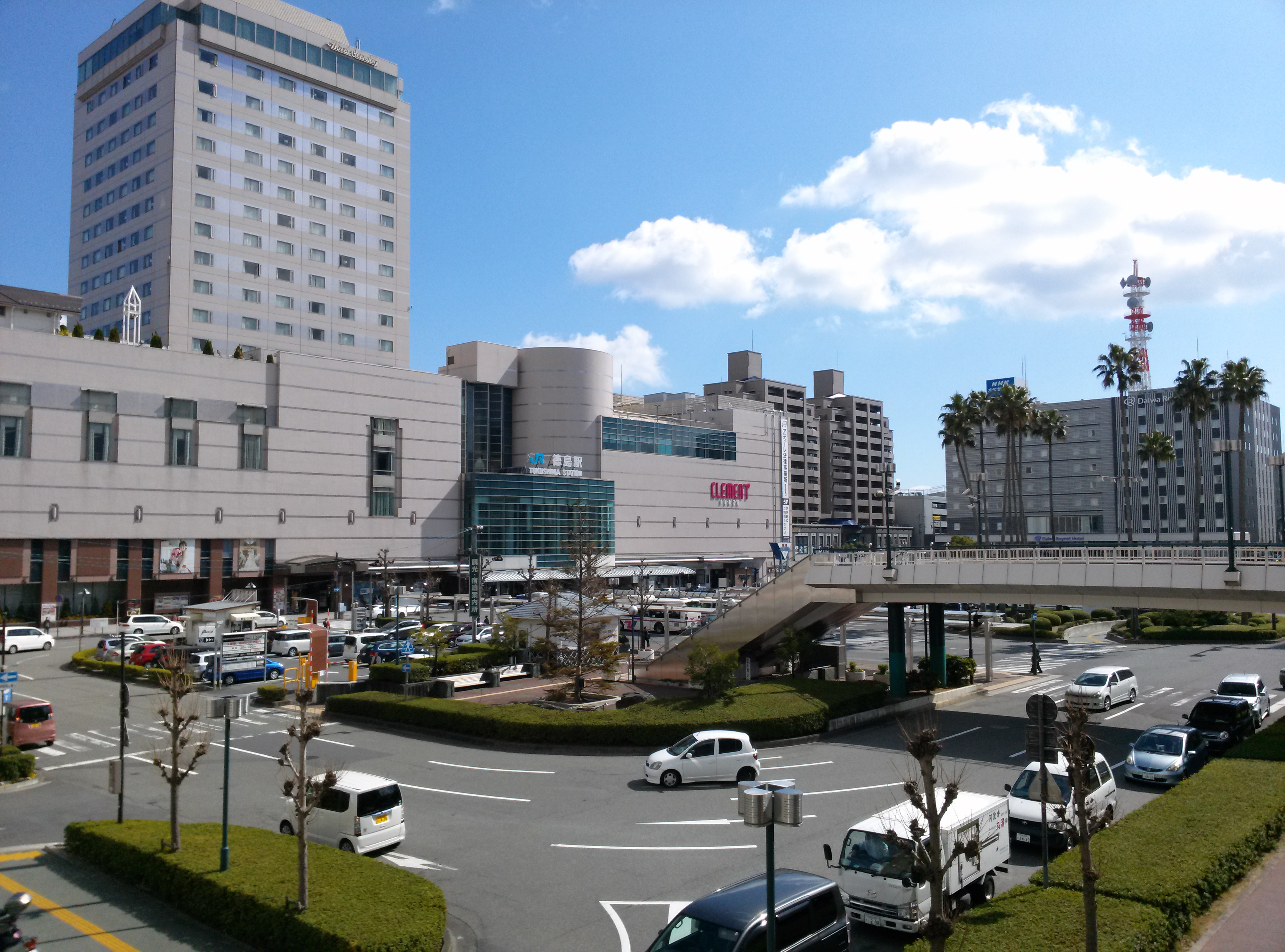 JR徳島駅前の風景